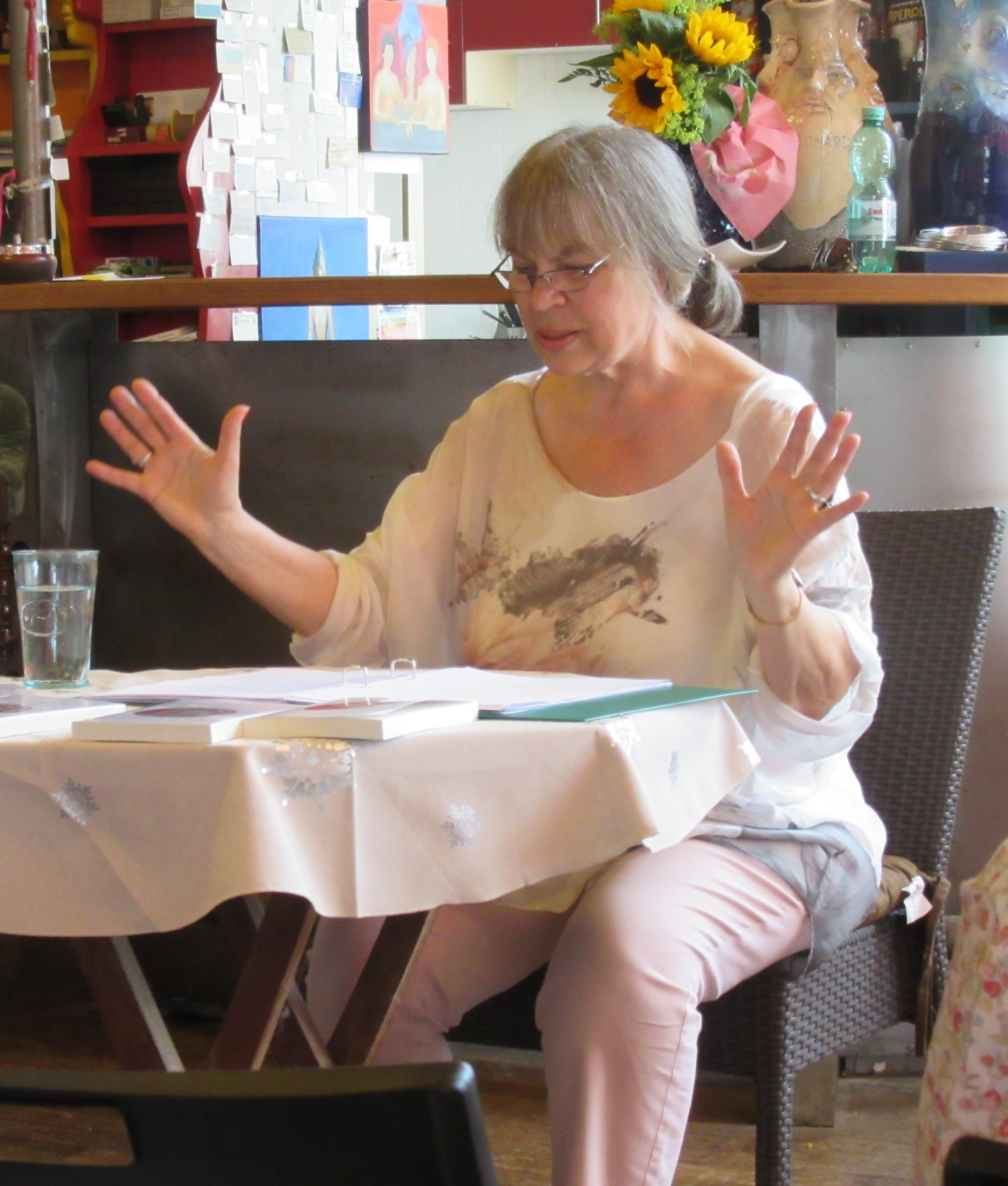 Buchpremiere, auf dem Zauberberg: Blumen des Unerwarteten 2017